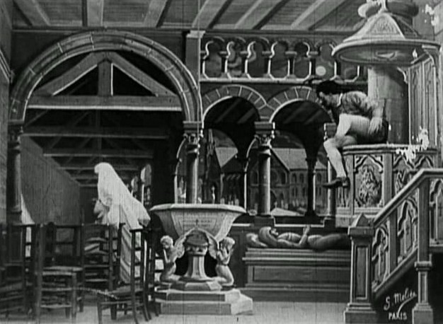 Méliès, Le diable au couvent (Star Film 185-187)